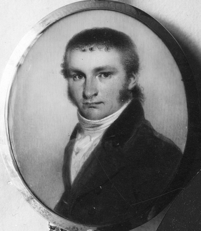 Stortingsmann Jens Severin Gasman, repro fra spansk miniatyr (perlemor)